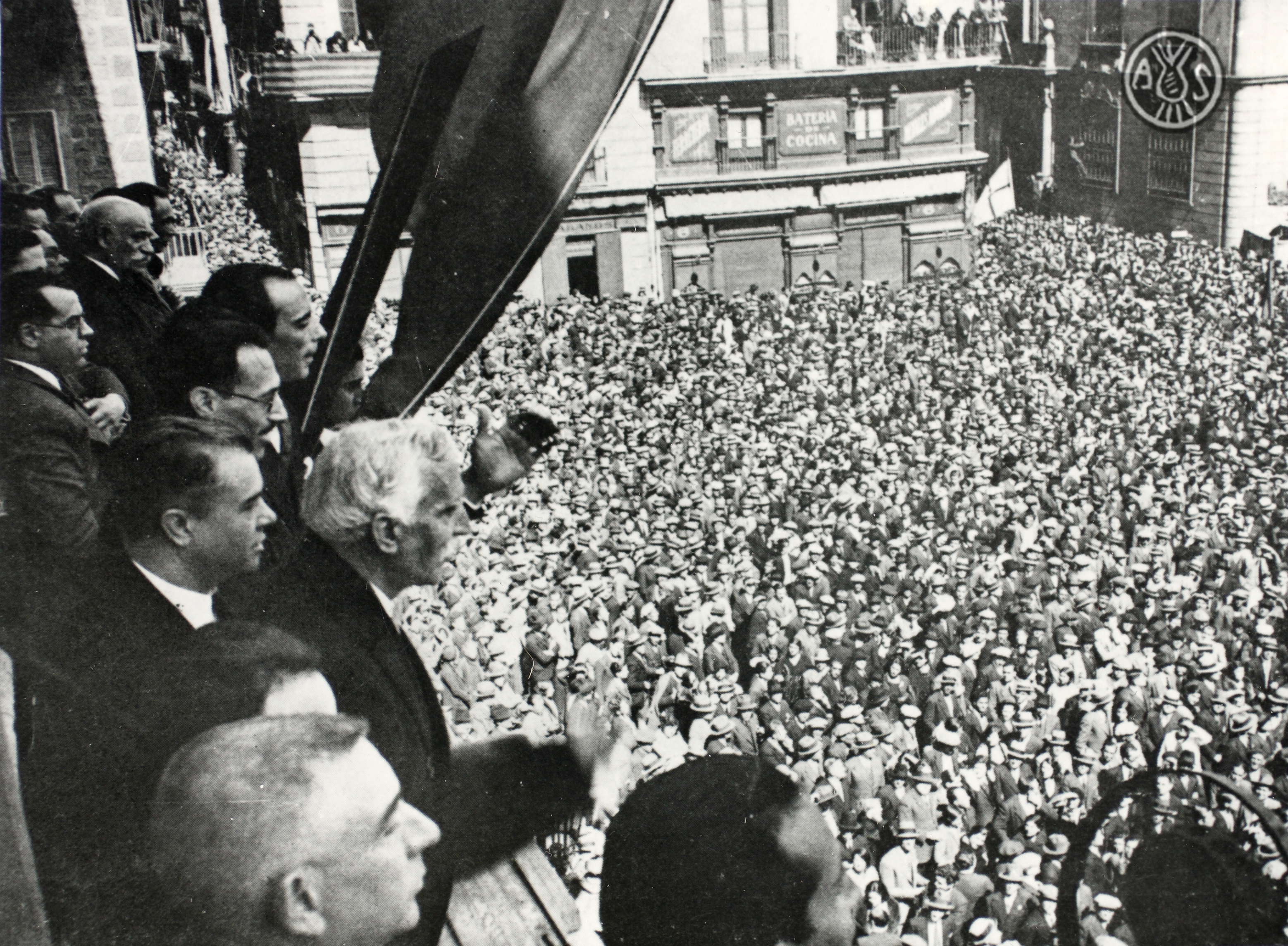 Francesc Macià proclama la Segona República al balcó del Palau de la Generalitat, amb Amadeu Aragay al seu costat i al darrere. Barcelona, 14 d'abril de 1931 (AHS)